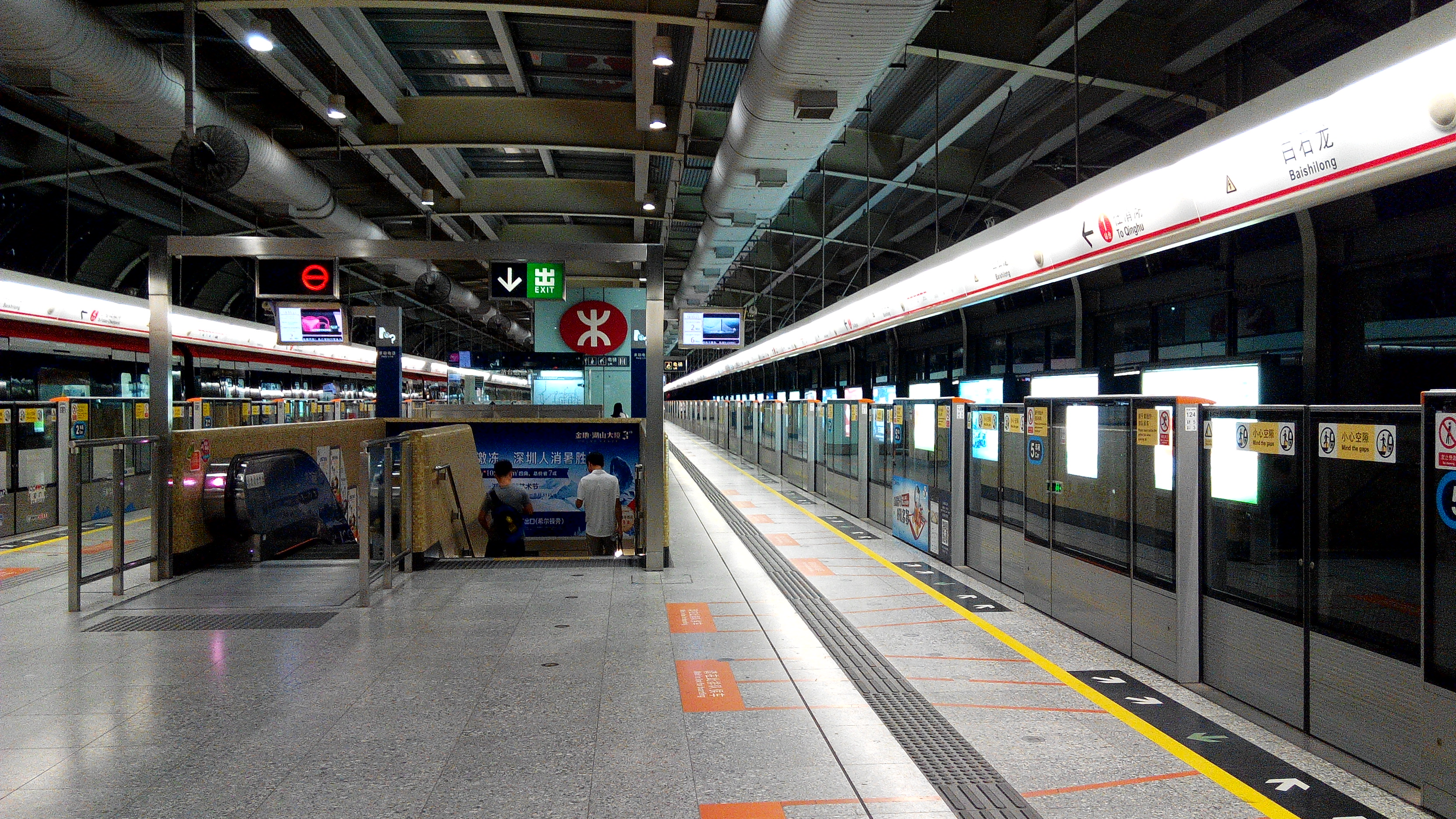 深圳地铁4号线白石龙站站台